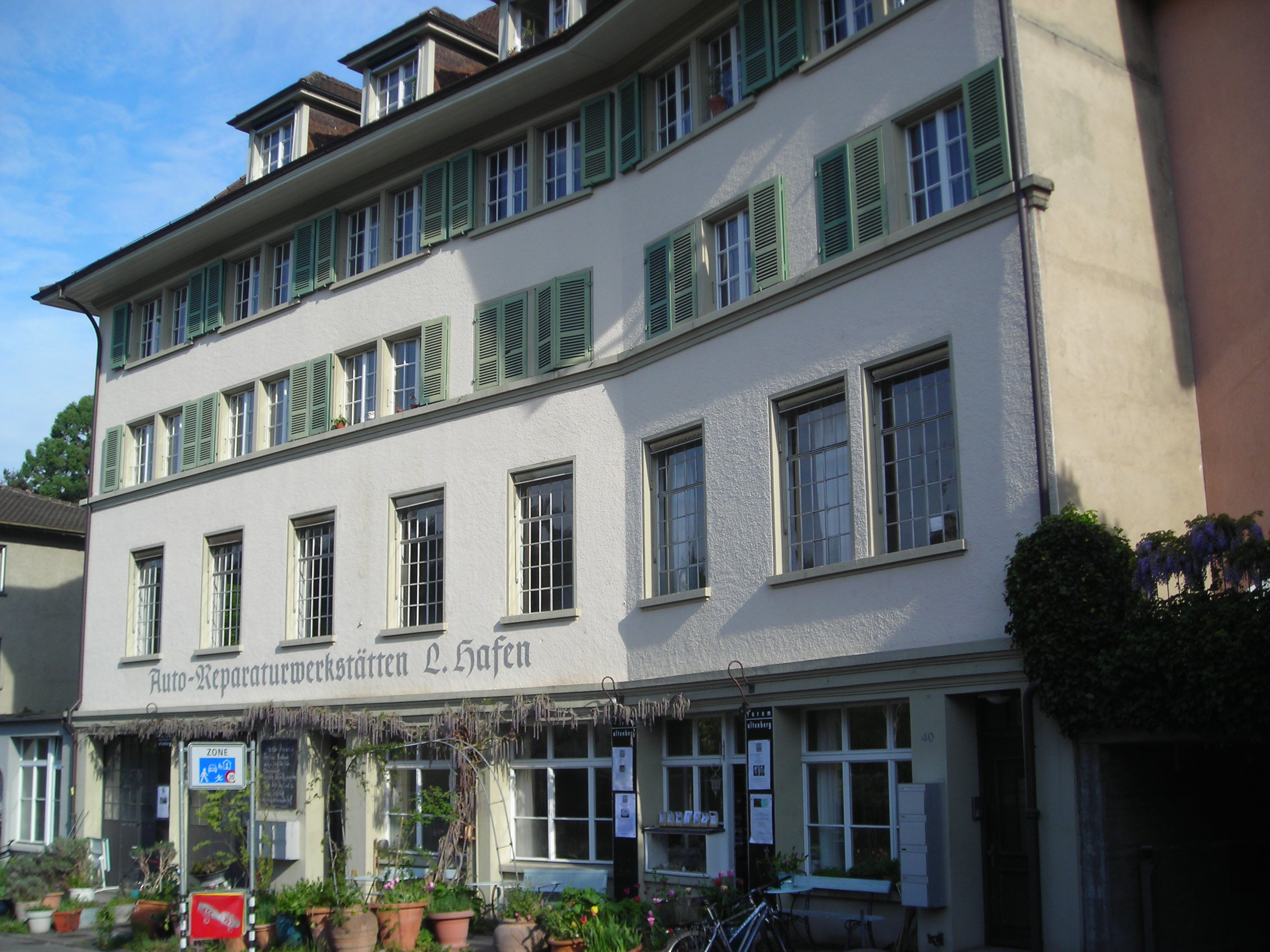 Altenbergstrasse 40, Bern, Switzerland